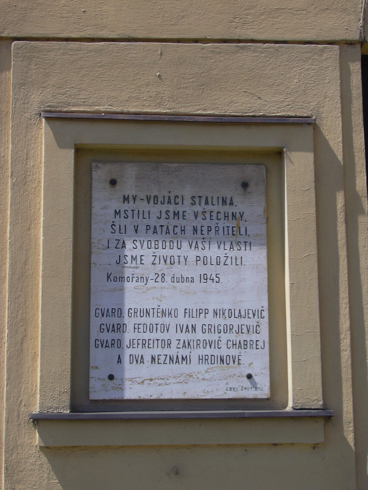 Pamětní deska padlých sovětských vojáků umístěná na budově obecního úřadu (Vyškov District - Czech Republic)